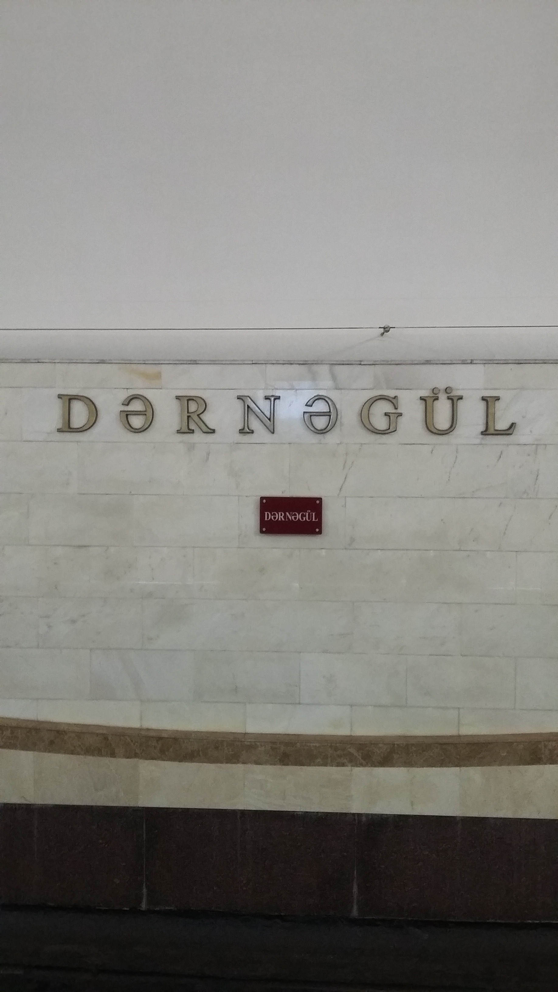 Dərnəgül metrostansiyası